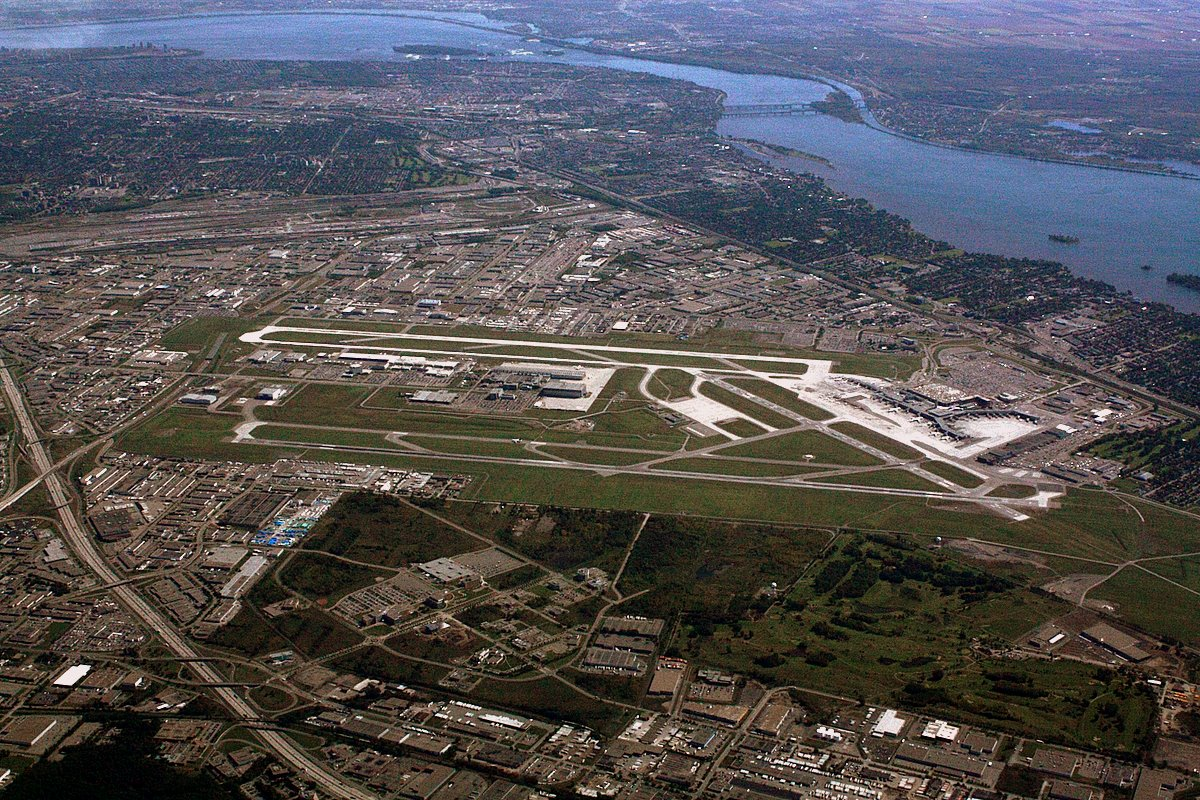 CYUL - Montreal Trudeau Airport